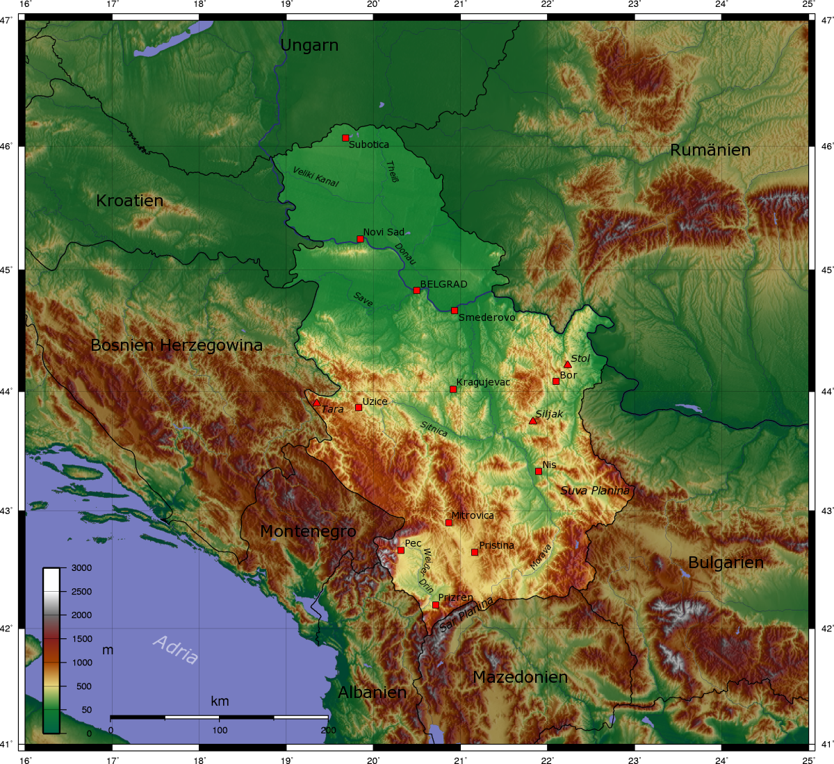 Topografische Karte von Serbien